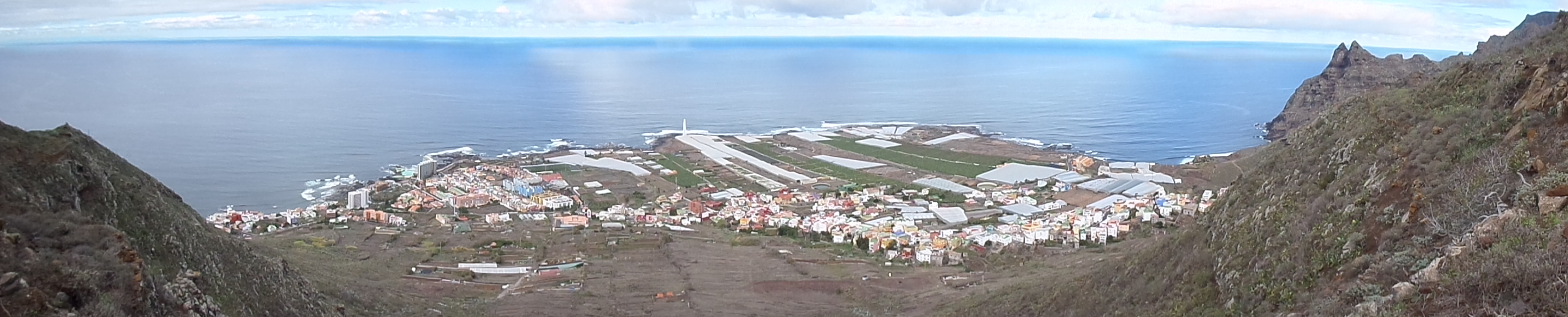 Vista panorámica de Punta del Hidalgo, Tenerife.